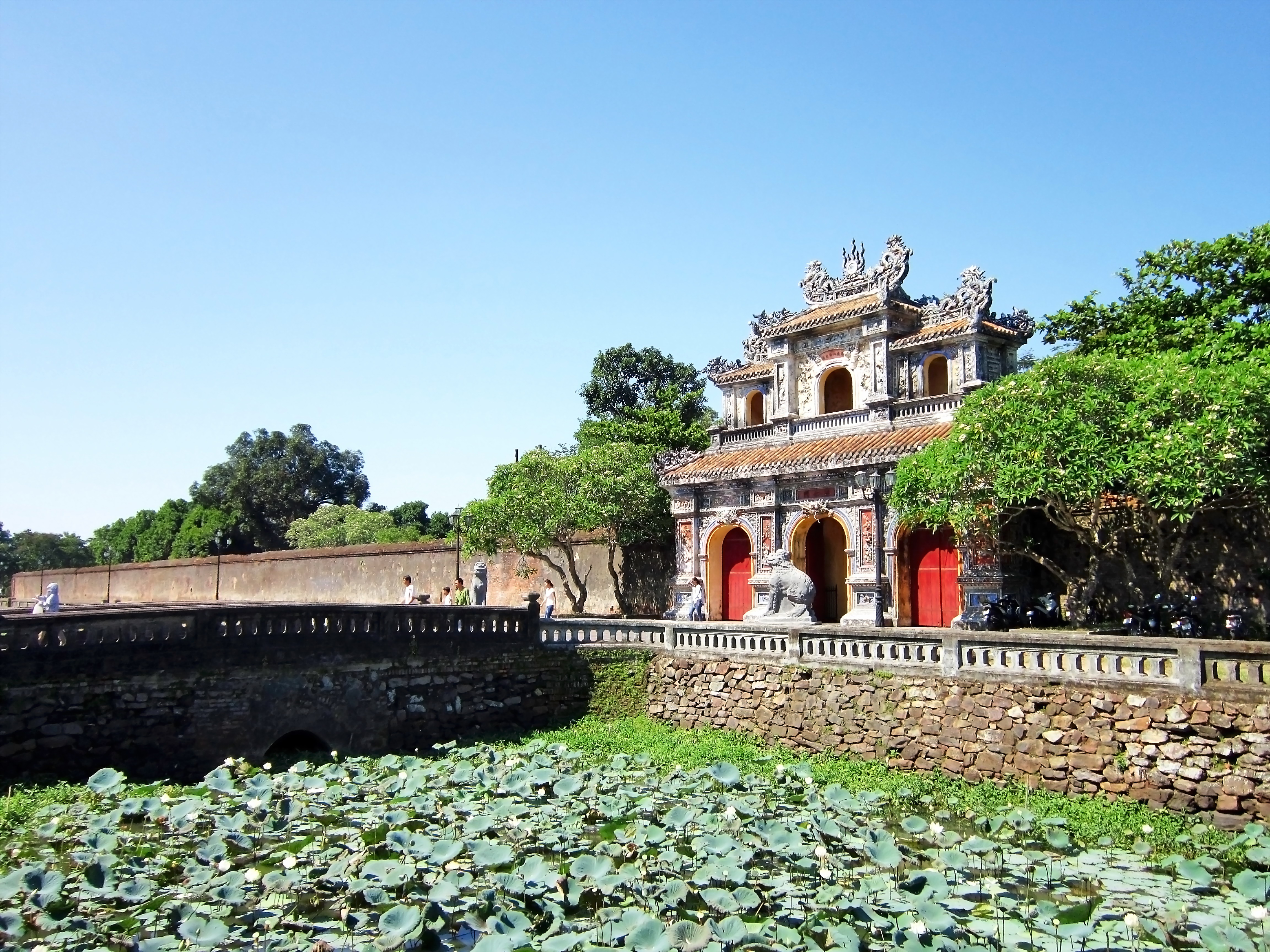 Cửa Hiển Nhơn hay Hiển Nhân nằm ở phía Đông của Hoàng thành Huế, trên đường Đoàn Thị Điểm, thuộc phường Thuận Thành, thành phố Huế, tỉnh Thừa Thiên - Huế, Việt Nam.